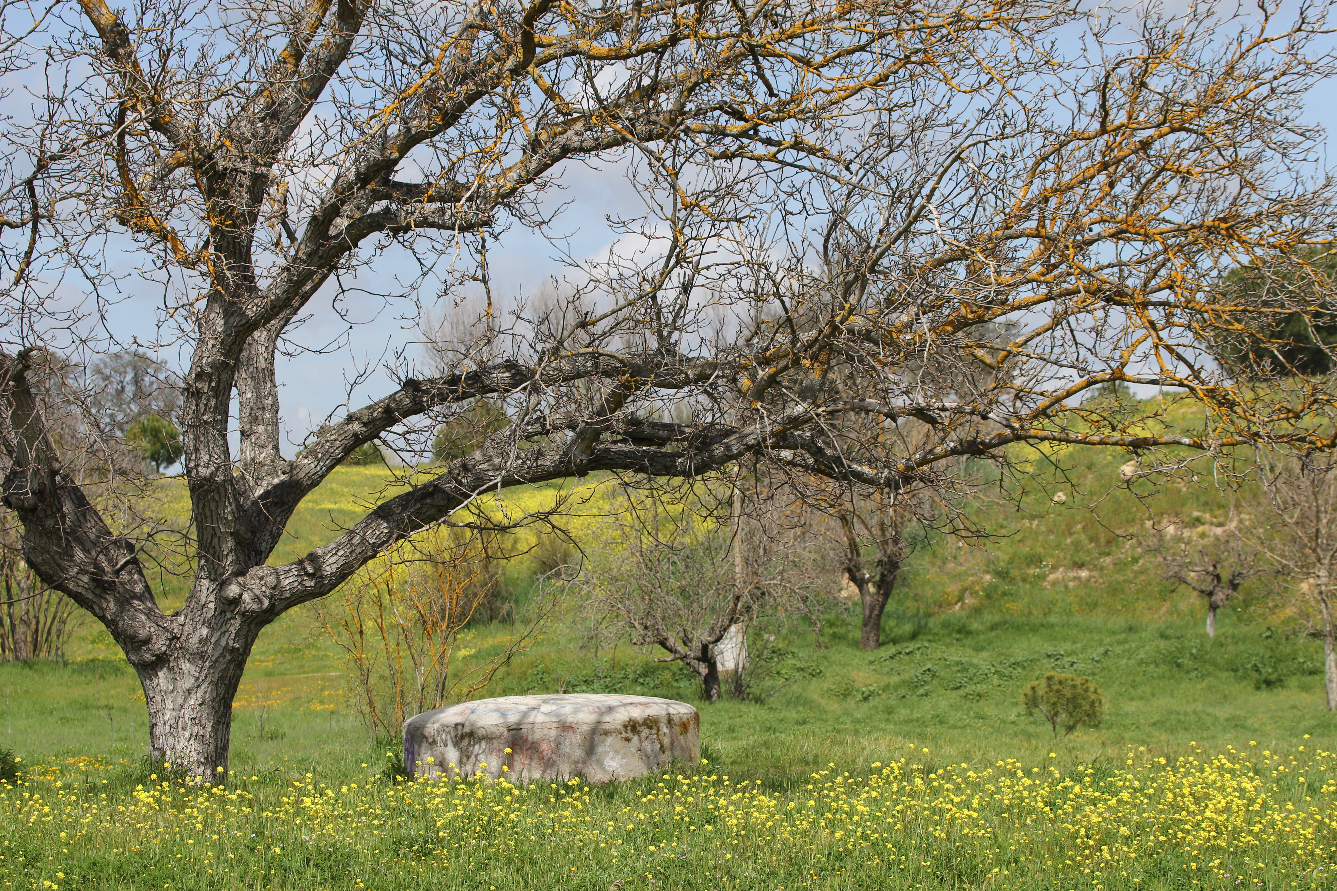 Cuenca del río Manzanares El Pardo 35 This is a photography of a Site of Community Importance in Spain with the ID: ES3110004. Natura2000 entry, EEA entry